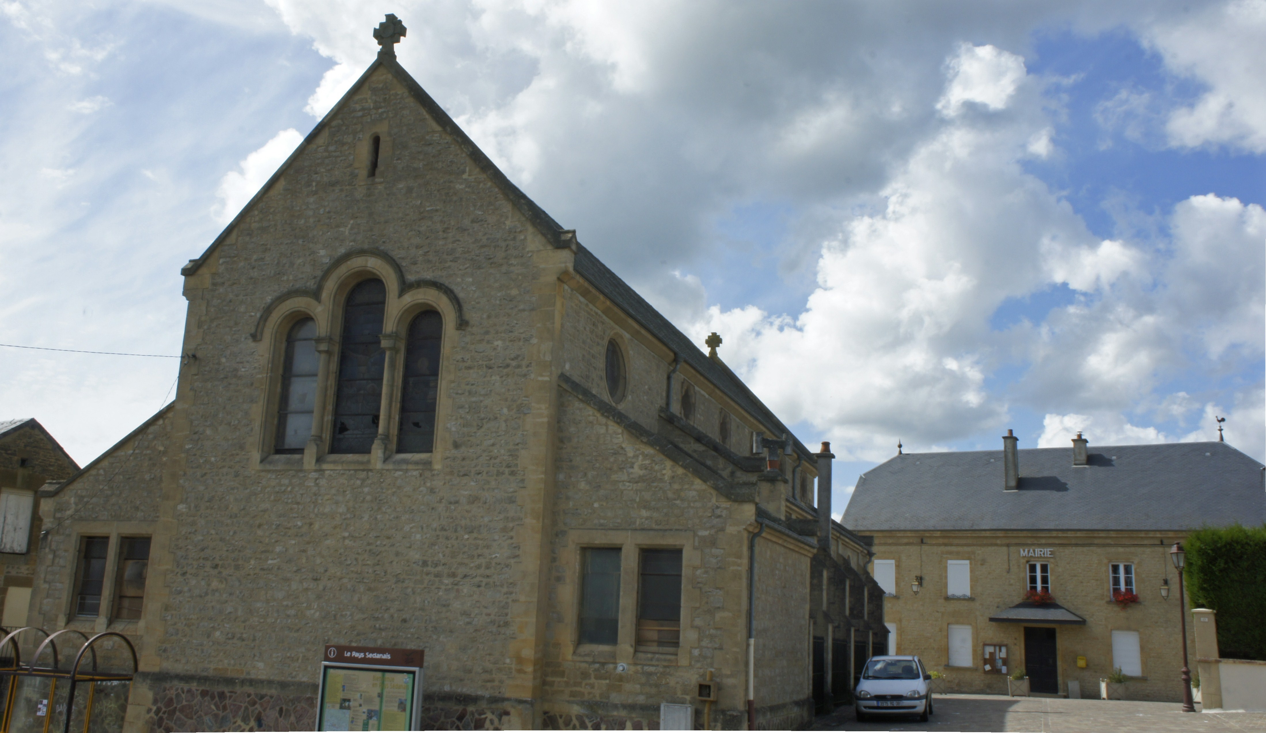 L'Église et la mairie du village.